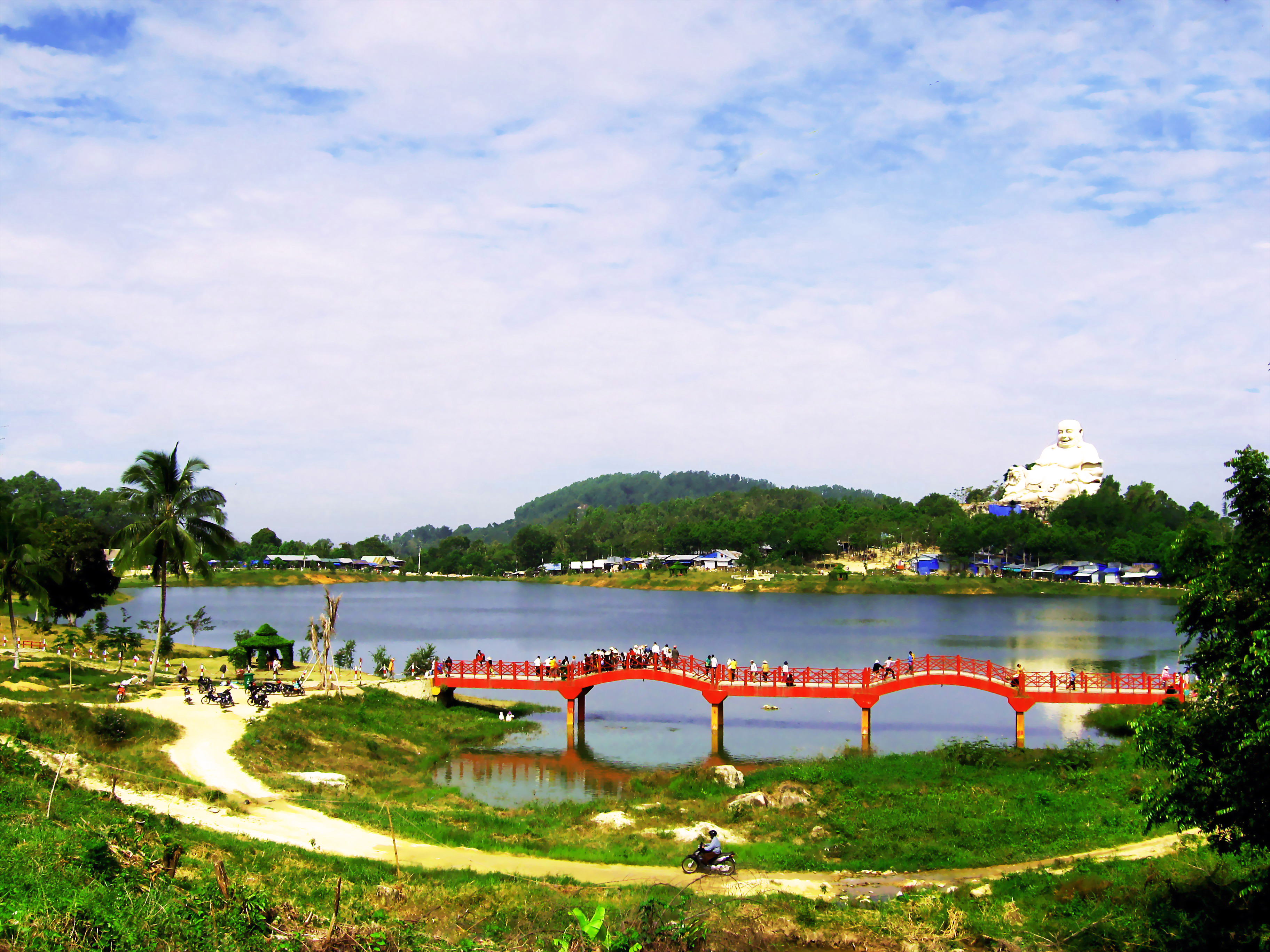 Phong cảnh hồ Thủy Liêm, nơi có đặt tượng Phật Di Lặc, trên đỉnh núi Cấm; thuộc huyện Tịnh Biên, An Giang, Việt Nam.